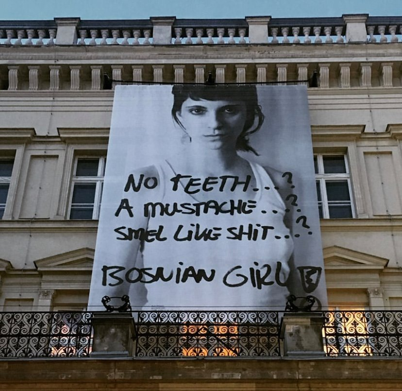 Šejla Kamerić, Bosnian Girl, 2003. Installation View at the 4. Berliner Herbstsalon, Maxim Gorki Theatre, October-November 2019.